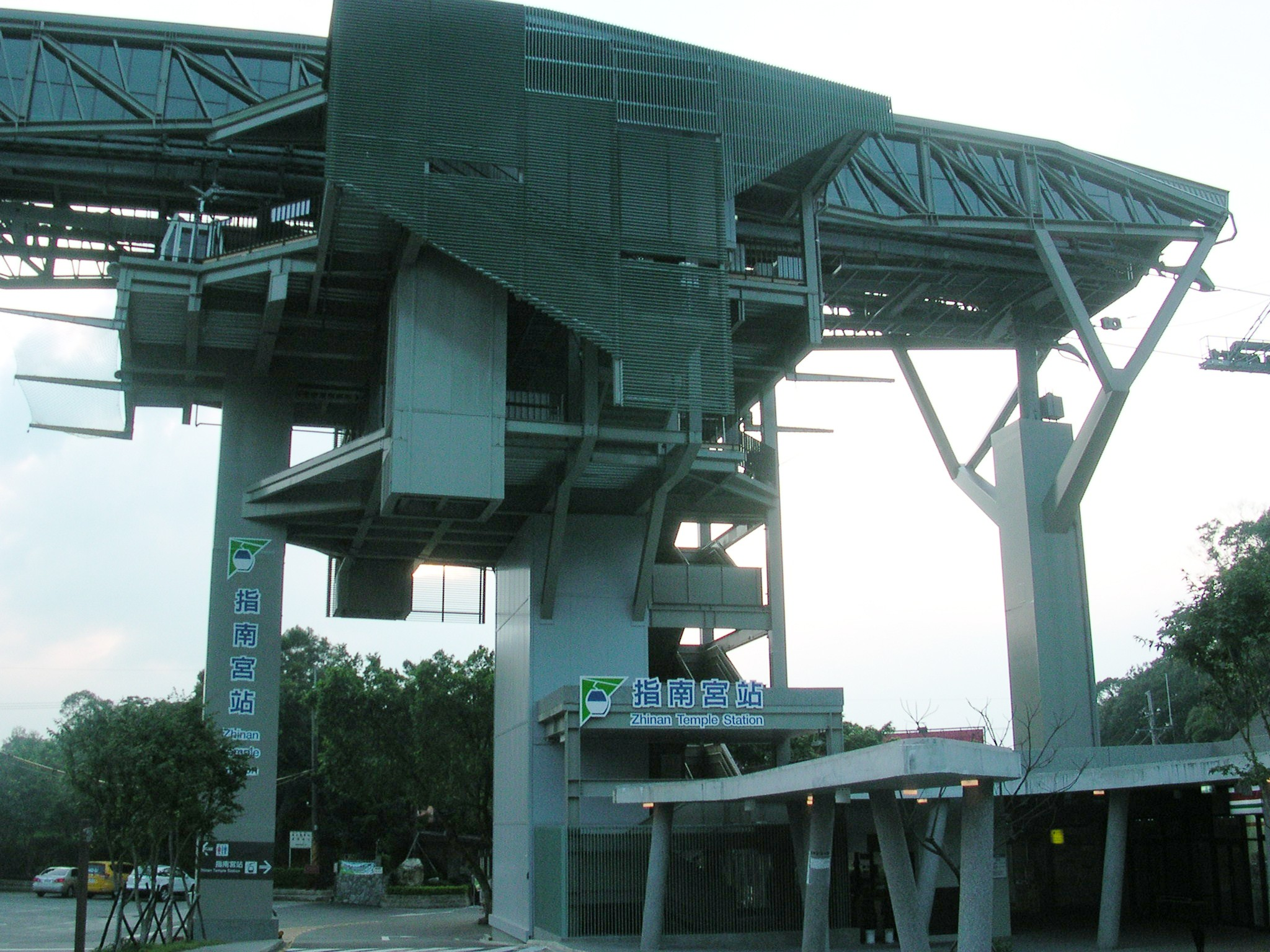 Taipei Maokong Gondola Zhinan Temple Station